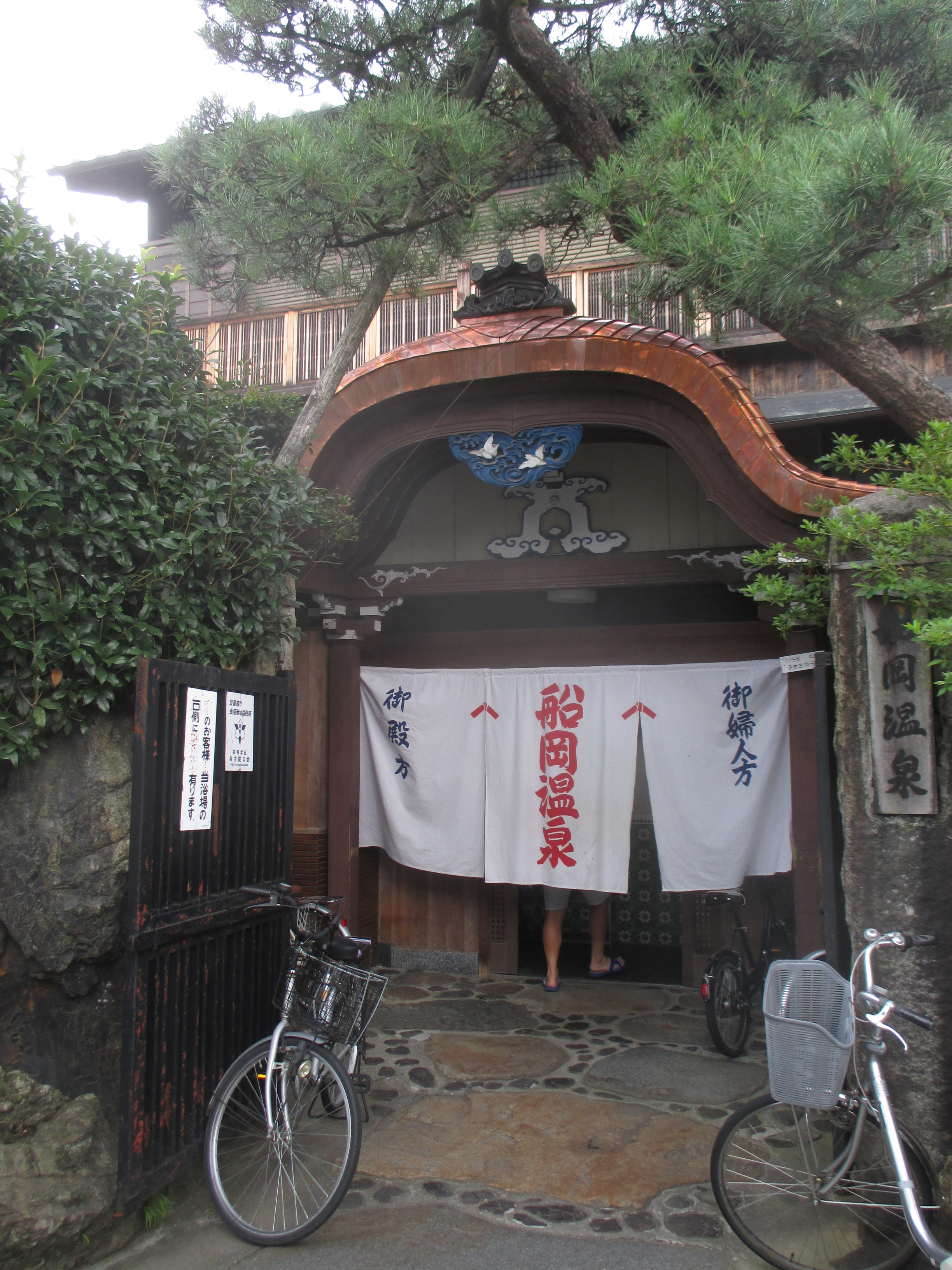 船岡温泉 Funaoka hot springs